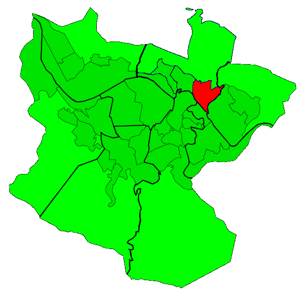 Zurbaran-Arabellako auzoa.